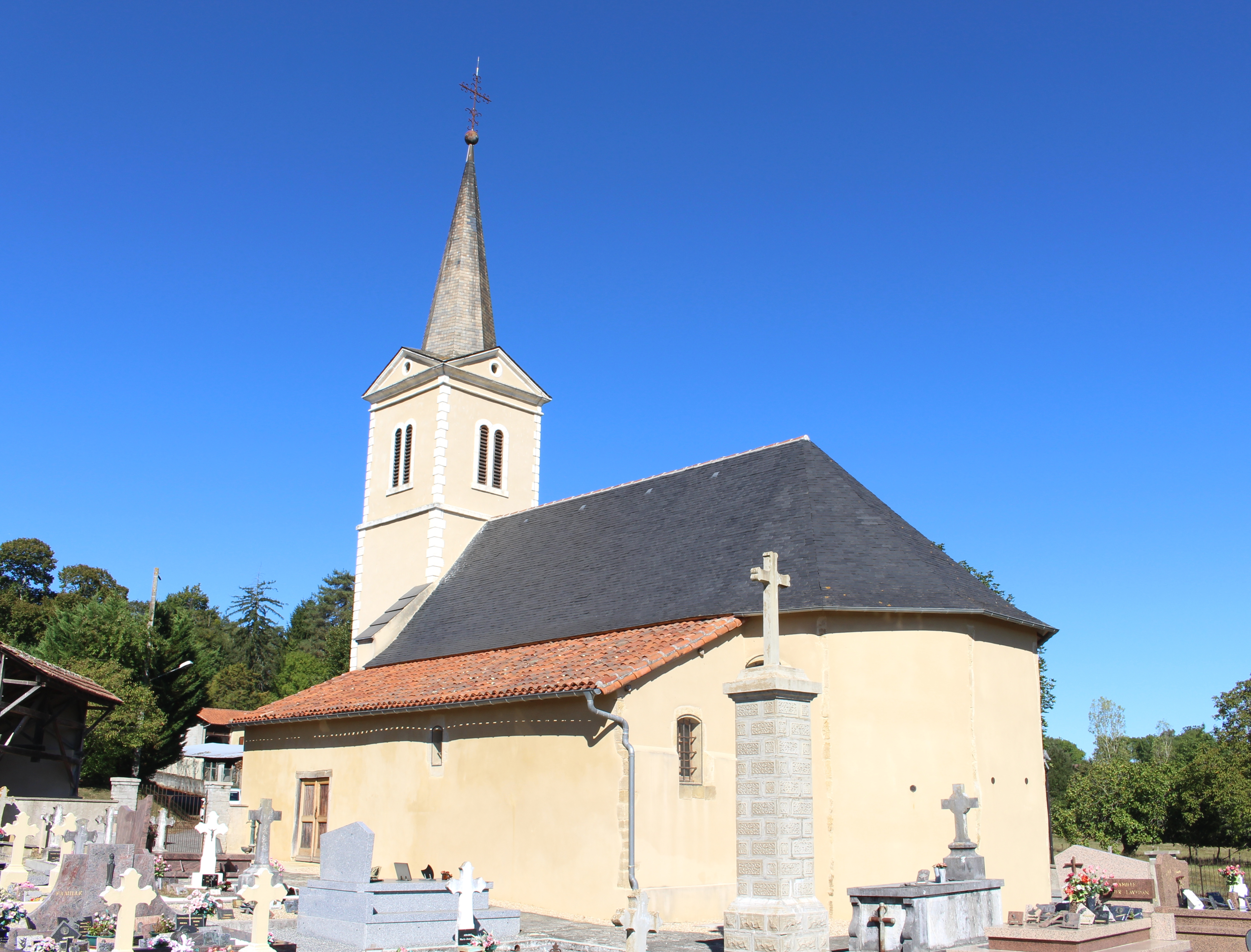 Église Martyre-de-Saint-Jean-Baptiste de Luby-Betmont (Hautes-Pyrénées)